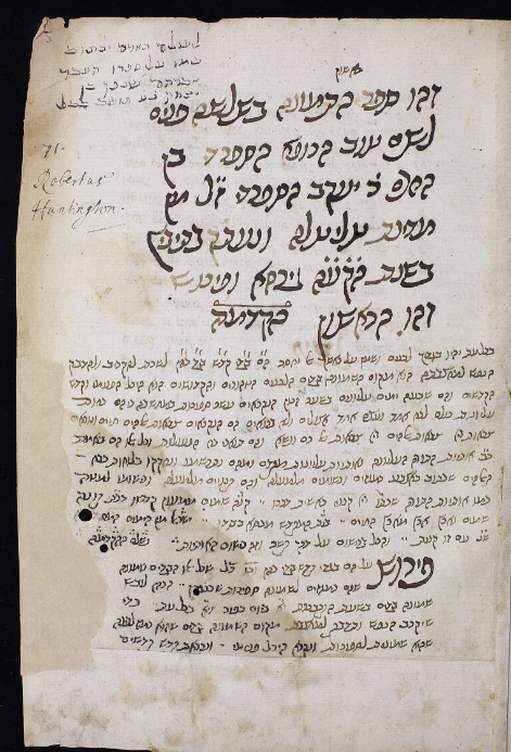 Extrait d'une Collection de texte kabalistiques réalisé en 1415.